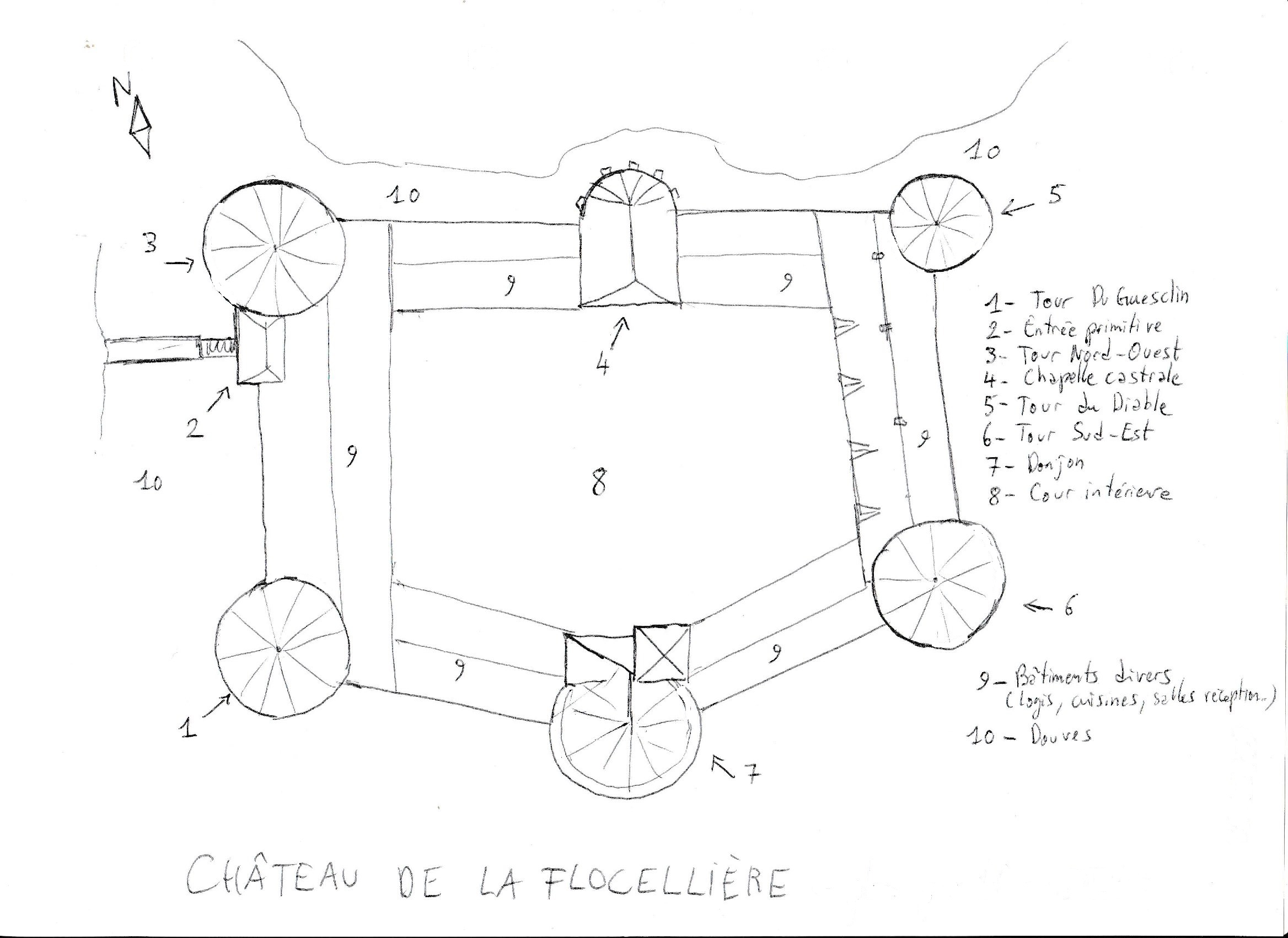 Dessin à l'échelle représentant une vue plongeante montrant l'implantation en 2D du château fort tel qu'il pouvait être au XVe siècle.